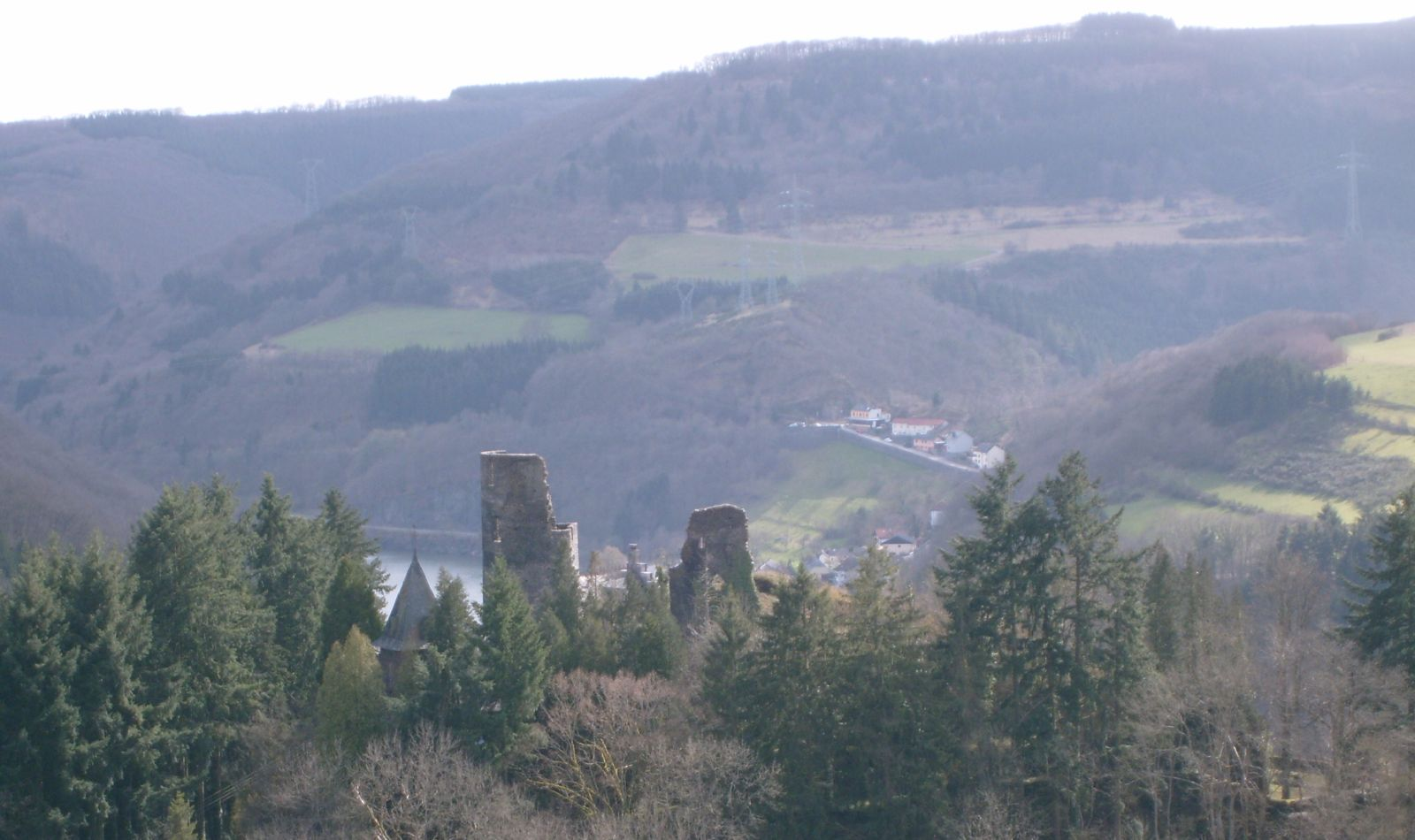 D'Buerg Falkesteen mat dem Ourdall a Biwels am Hannergronn, vum Waldhaff aus fotograféiert. 29.03.2008